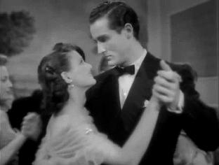 Geraldine Brooks e Vittorio Gassman ; Screenschot di Ho sognato il paradiso, film del 1949, diretto da Giorgio Pastina